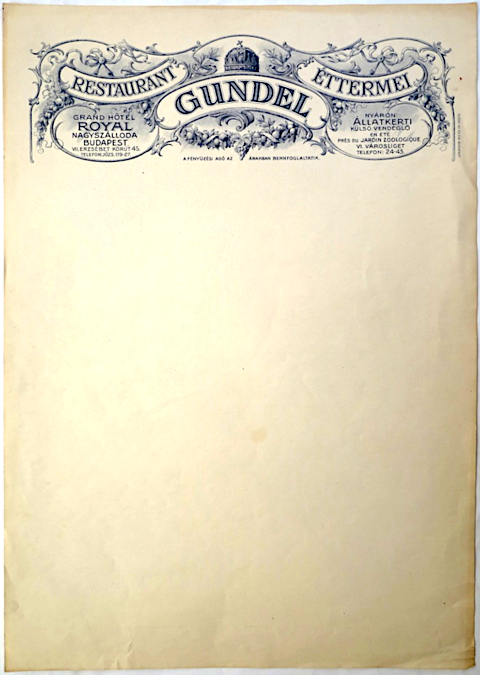 GUNDEL